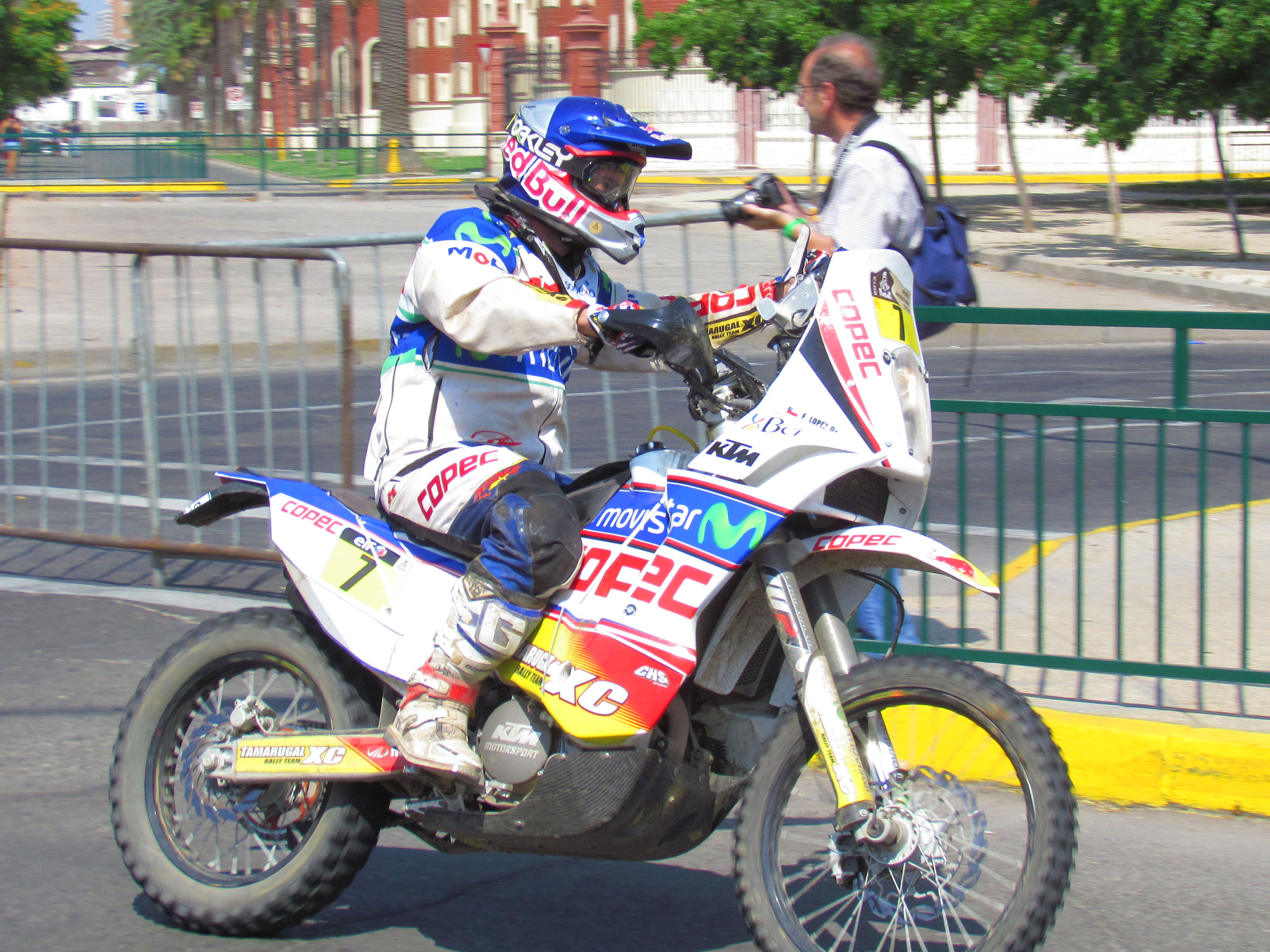 Dakar